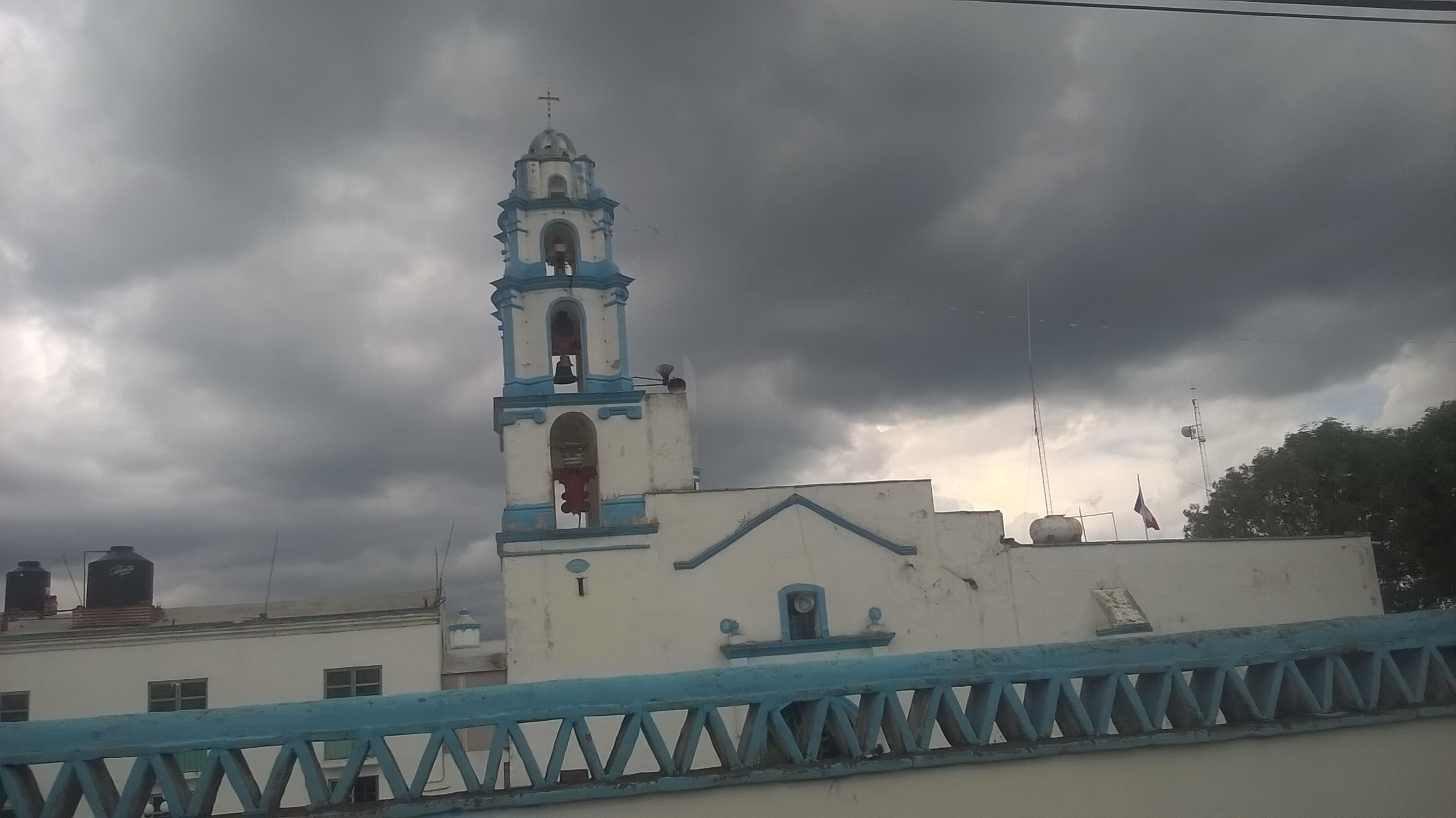 Parroquia de Nuestra Señora de Loreto